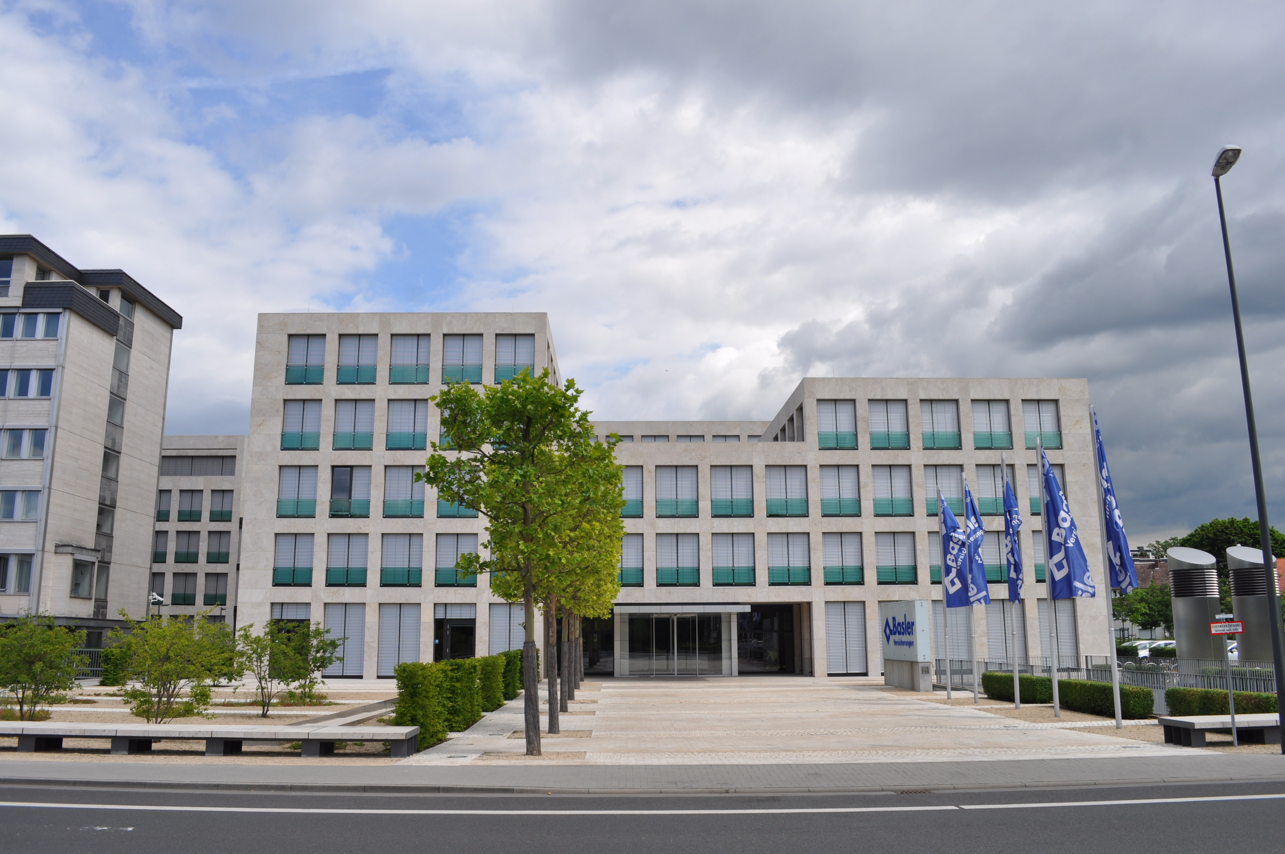 Bad Homburg, Neubau der Basler Versicherungen